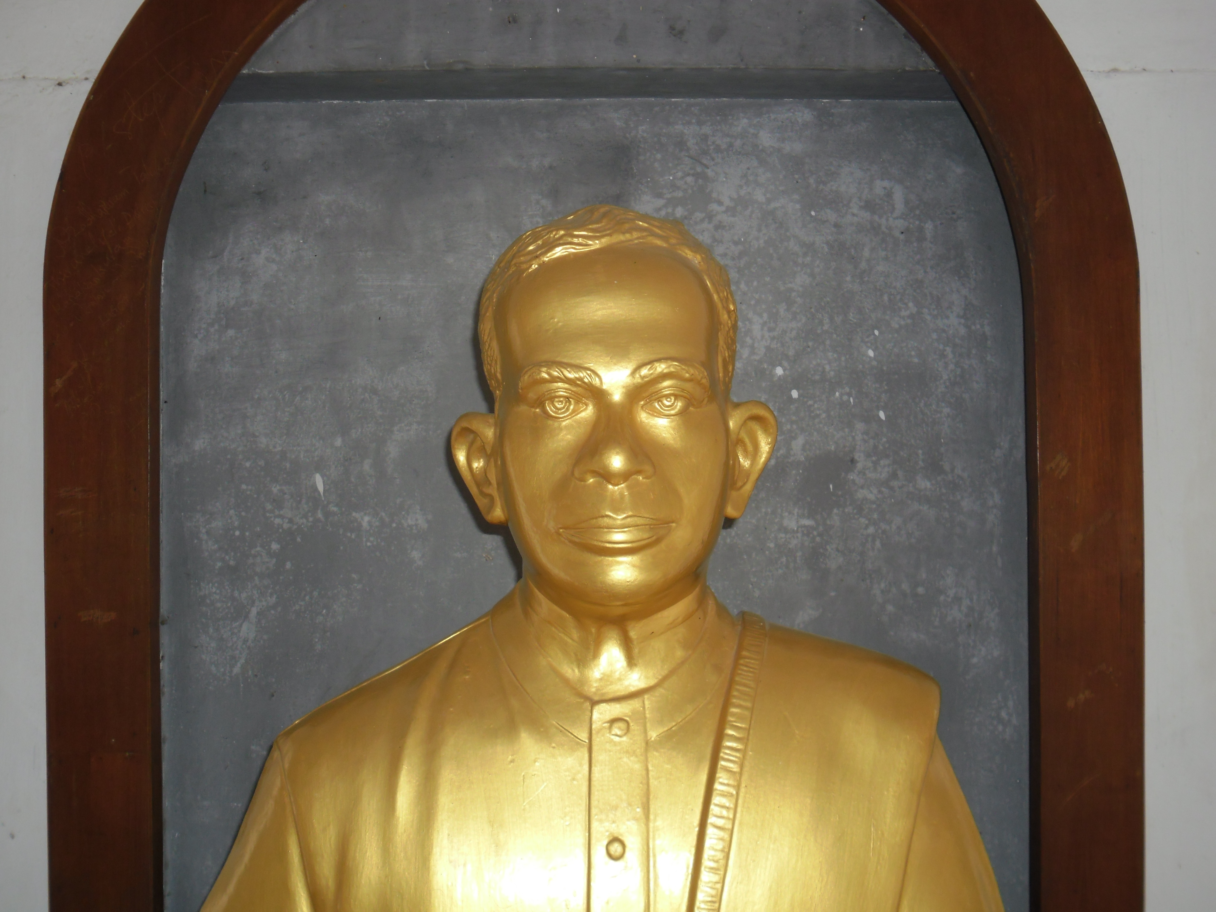 பக்தவத்சலம் சிலை